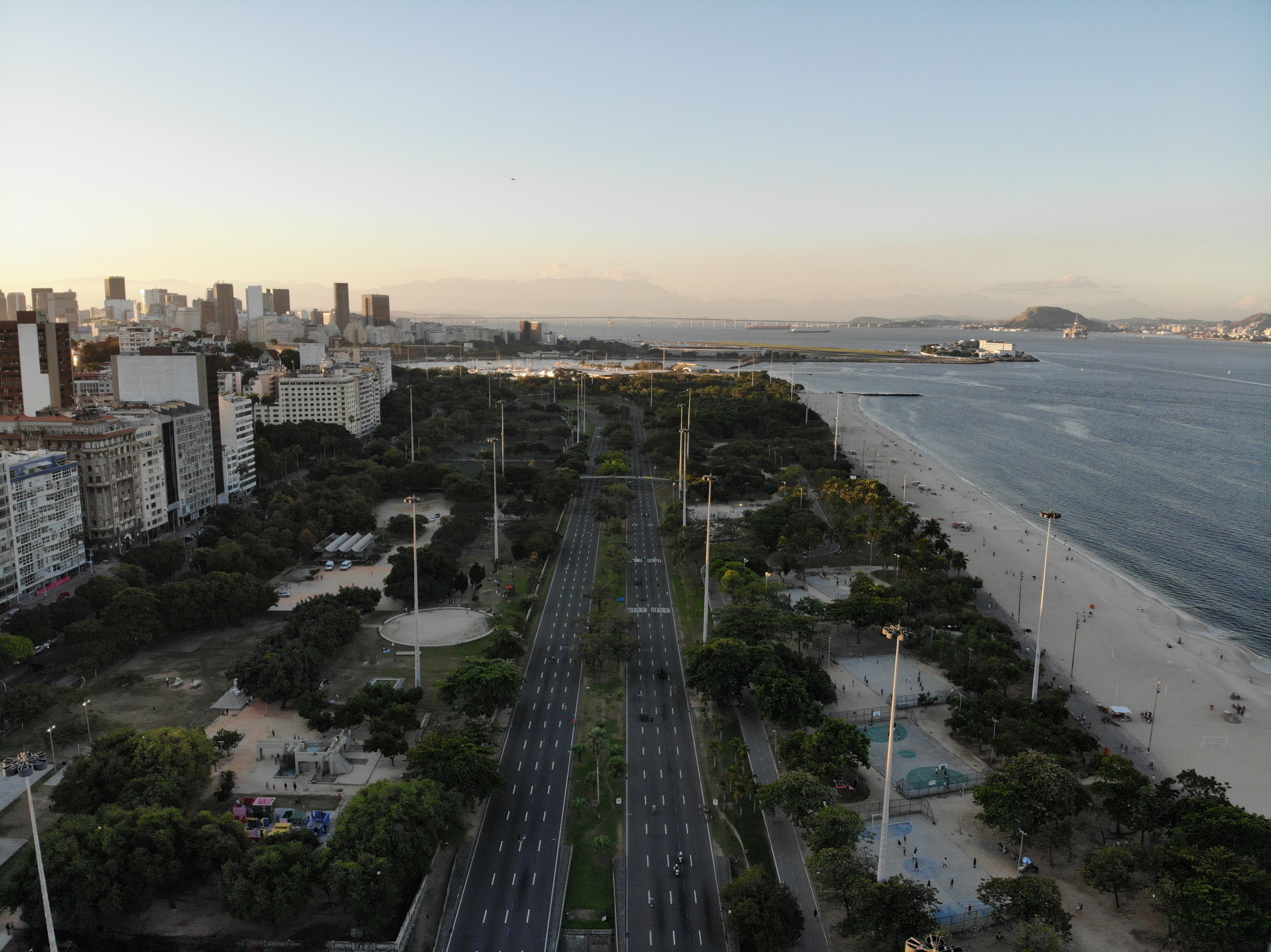 Aterro do Flamengo visto de cima